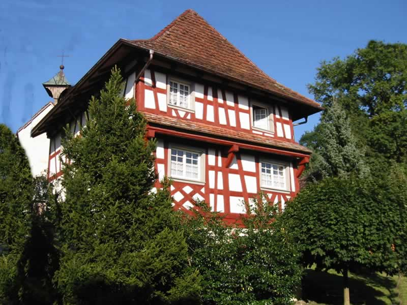 Das Augedinghaus von 1843, neben der Andreaskapelle in Deisendorf